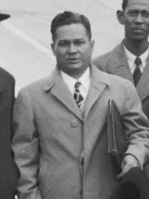 Collectie / Archief: Fotocollectie Anefo Reportage / Serie: [onbekend] Beschrijving: Aankomst West Indische delegatie Trefwoorden: AANKOMST, delegatie Auteursrechthebbende: Nationaal Archief Materiaalsoort: Negatief (zwart/wit) Nummer archiefinventaris: bekijk toegang 2.24.01.03 Bestanddeelnummer: 901-8096 V.l.n.r. van rechts naar links: F.J.G. Kwartsz, C.A. Eman, E.J. Jonkheer, dr. M.F. da Costa Gomez, W.L. Plantz (allen afkomstig van Curaçao) H. Miskin, S. Rambaran, A.M. van Eyck, J.C. Ho A Sjoe, F.H.R. Lim A Po, A.R.L. Smit (allen afkomstig uit Suriname) Plaats: Schiphol